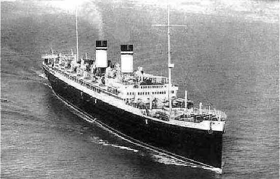 il transatlantico Augustus in navigazione nel Mediterraneo con i colori della Società Italia di Navigazione in una foto tratta da una pubblicazione della Società Italia di Navigazione